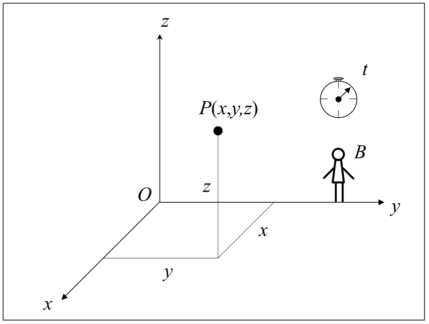 Erreferentzia-sistemako koordenatu kartesiarren sistema eta neurketa espazio-denboralak egiten dituen behatzailearen azalpen grafikoa.